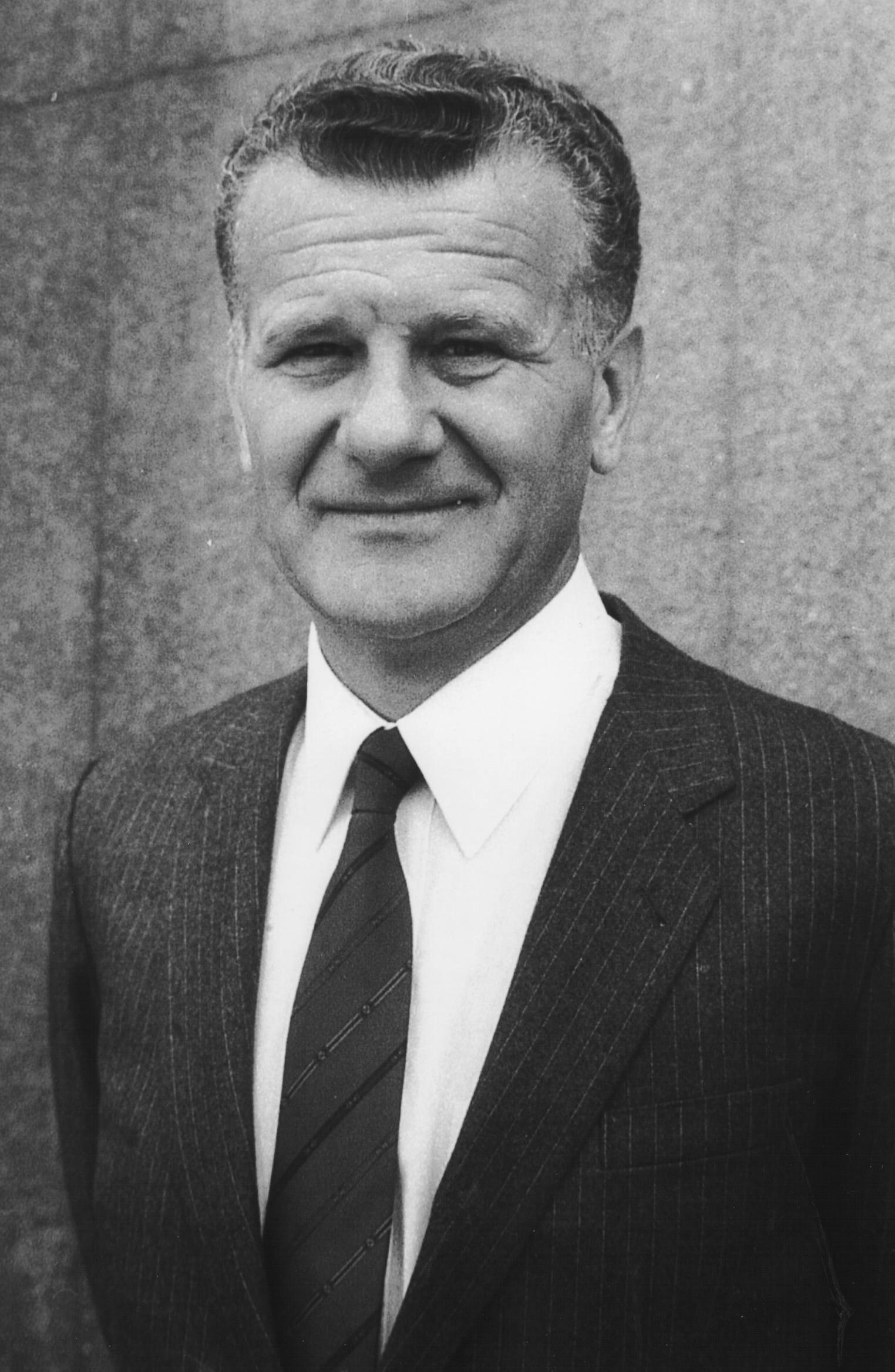 Ivan Stambolić, maj 1986.foto: Stevan Kragujević (po odobrenju kćerke Tanje Kragujević)